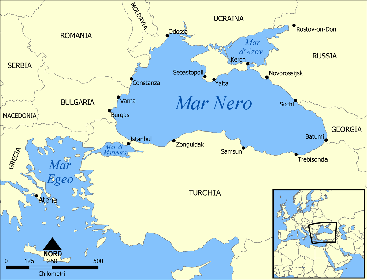 Rifatta sulla versione inglese